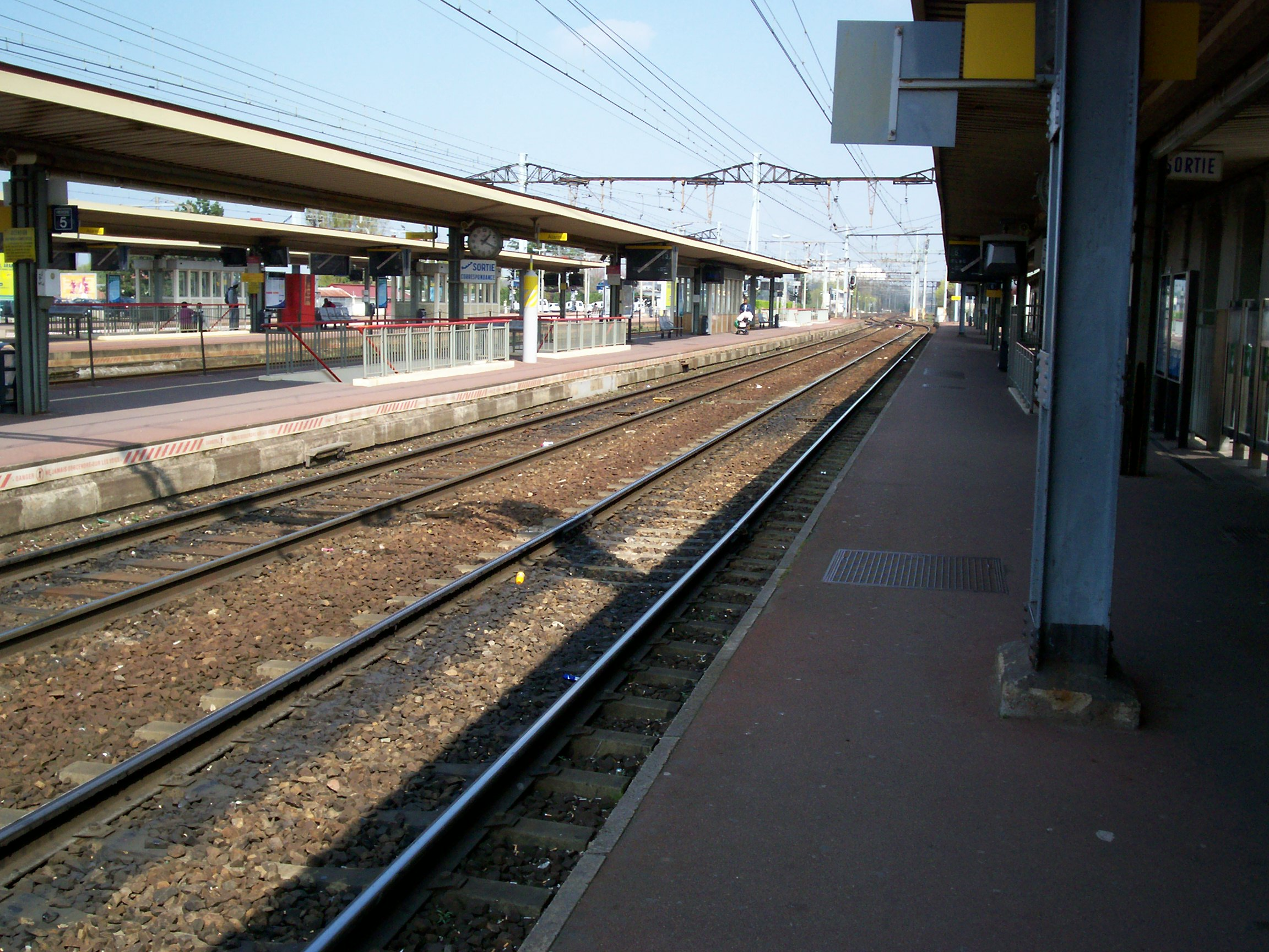 Gare de Brétigny